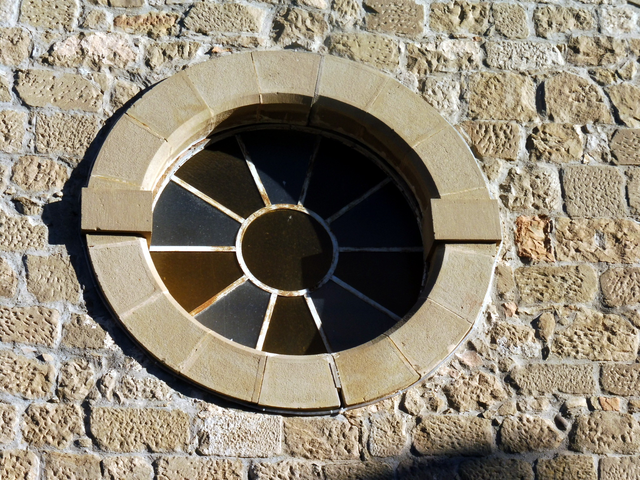 Església de Sant Salvador de Gerb (Os de Balaguer): òcul